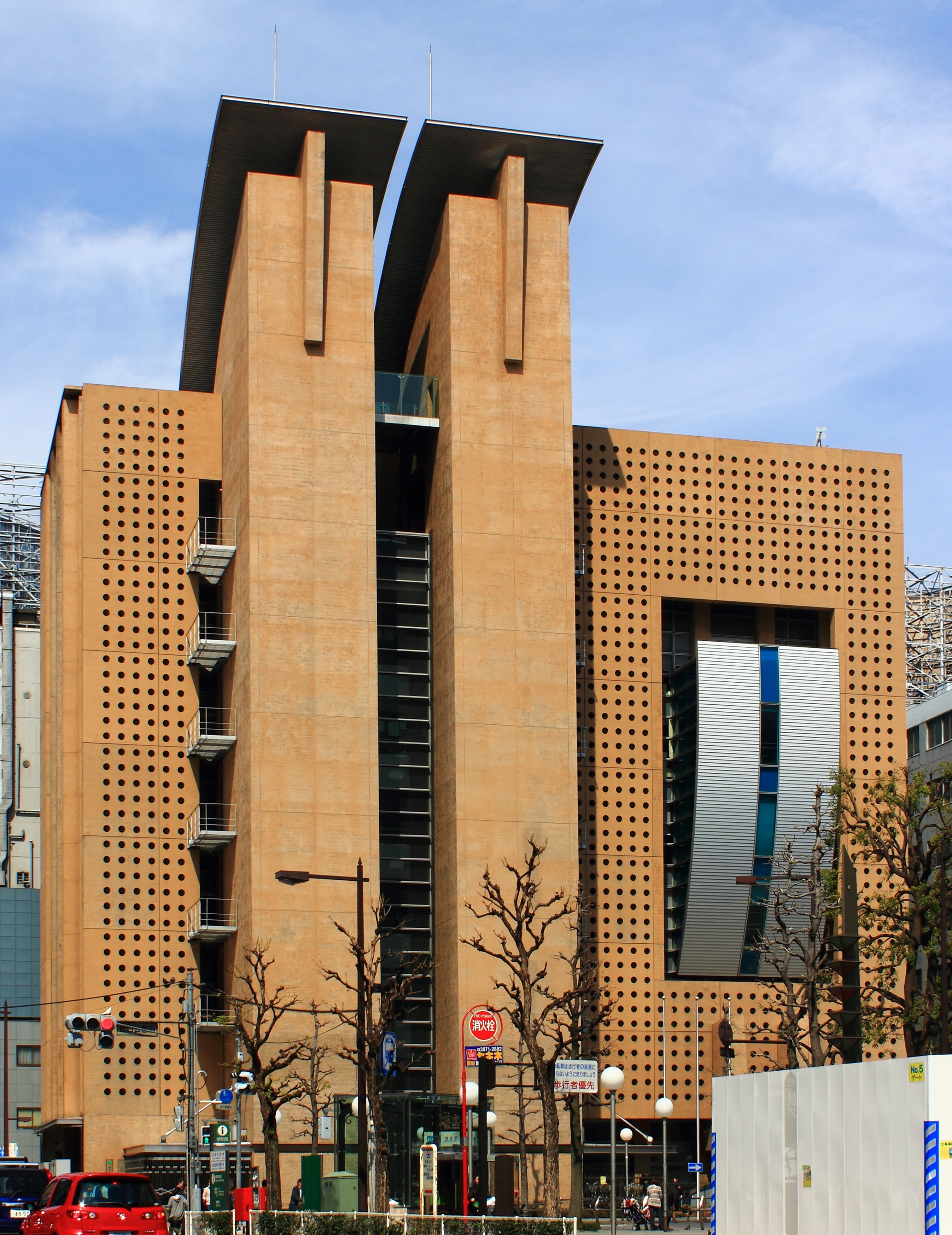 東京都豊島合同庁舎（東京都豊島区）、大江匡設計